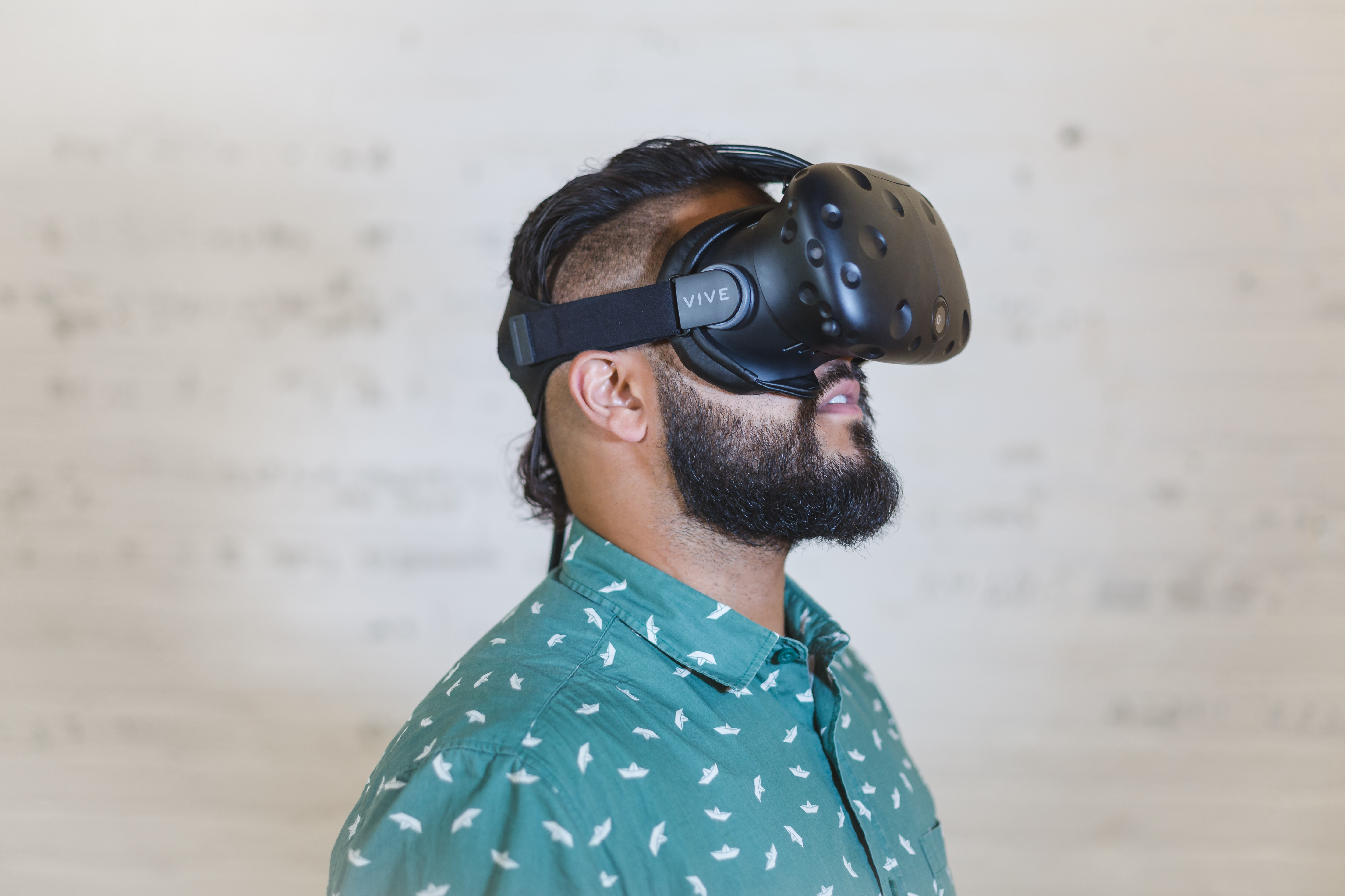 Mees kannab HTC Vive'i peaseadet.